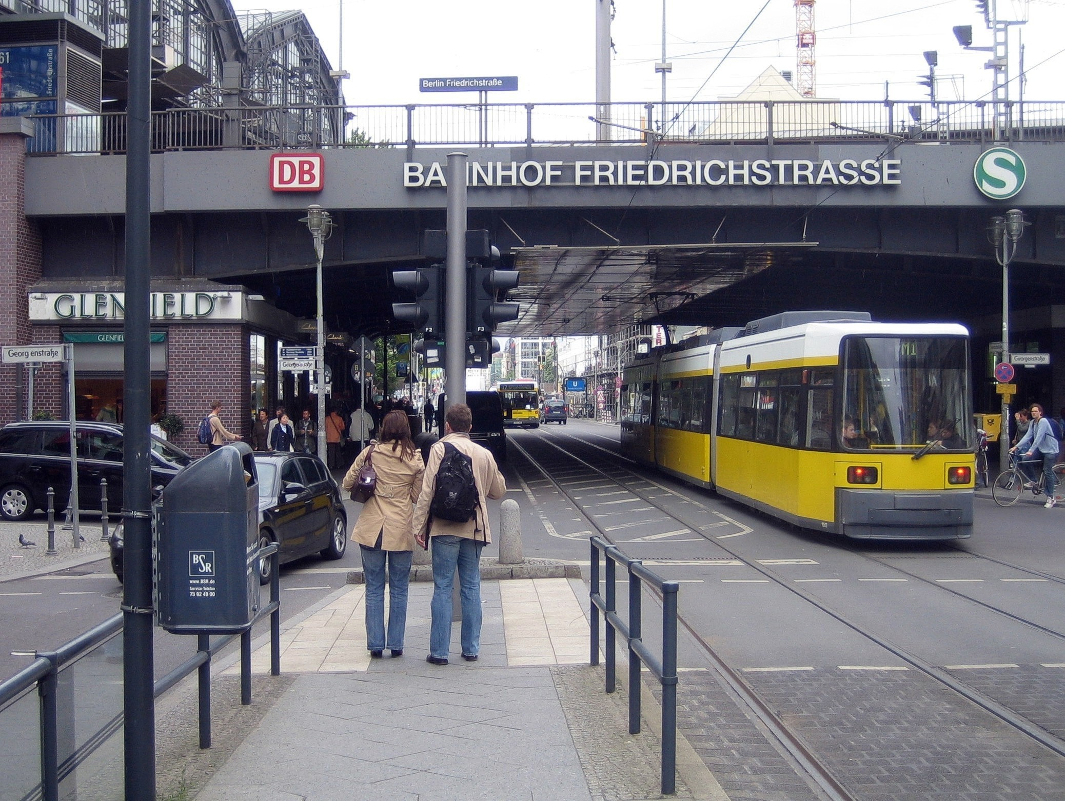 Berlin Friedrichstrasse, Bahnhofsbrücke.